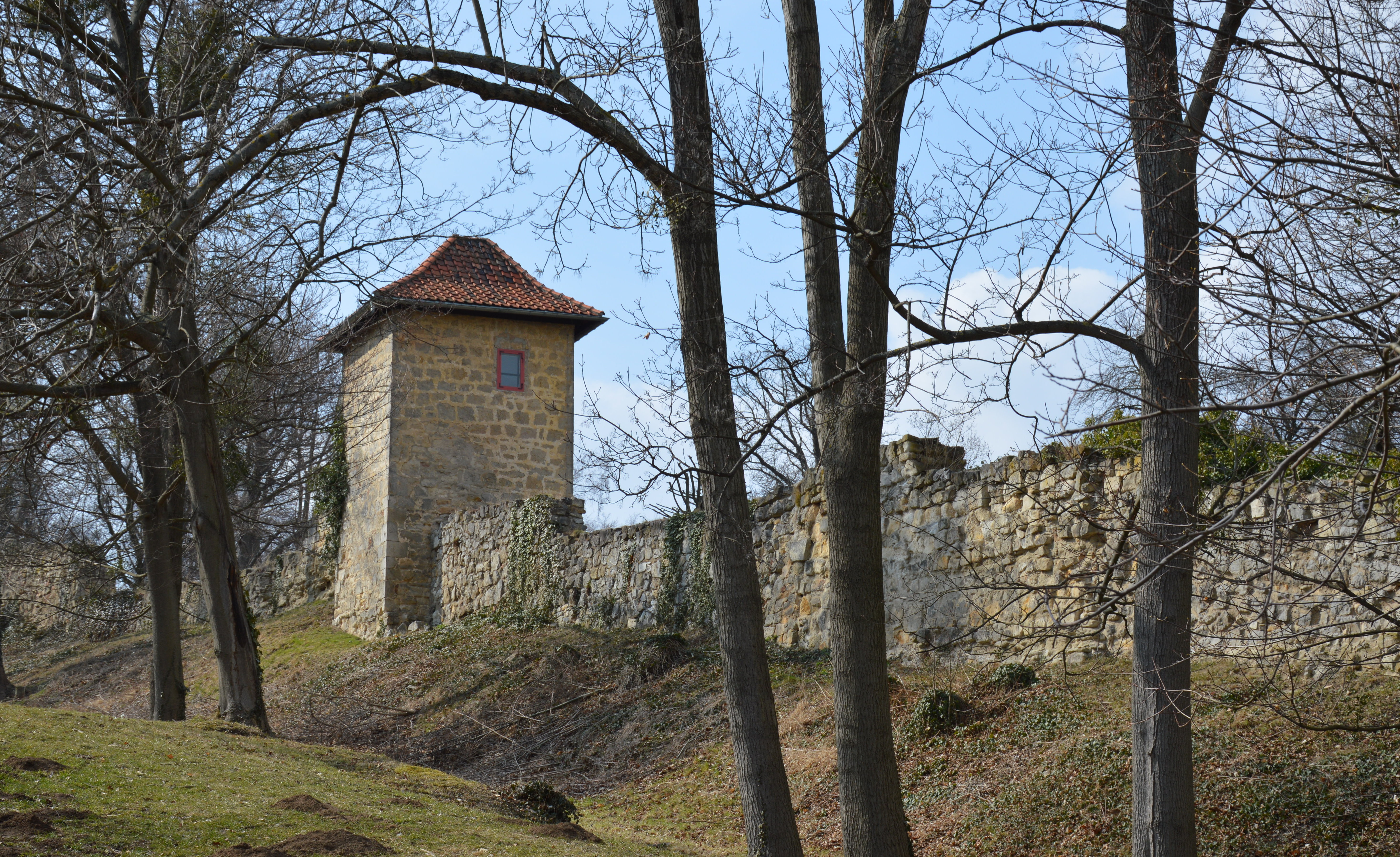 Turm der Stadtbefestigung Blankenburg